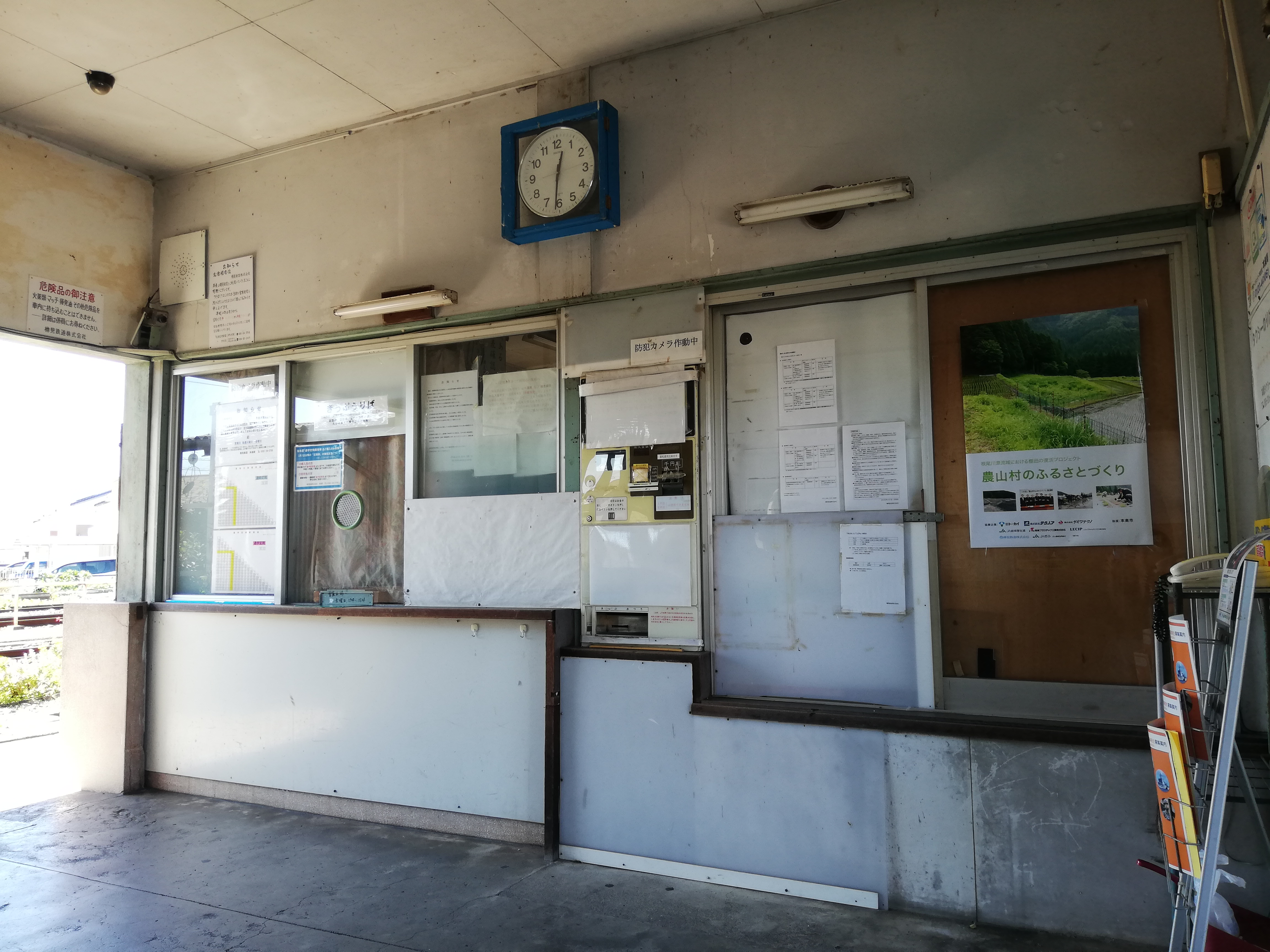 樽見線の北方真桑駅内装。